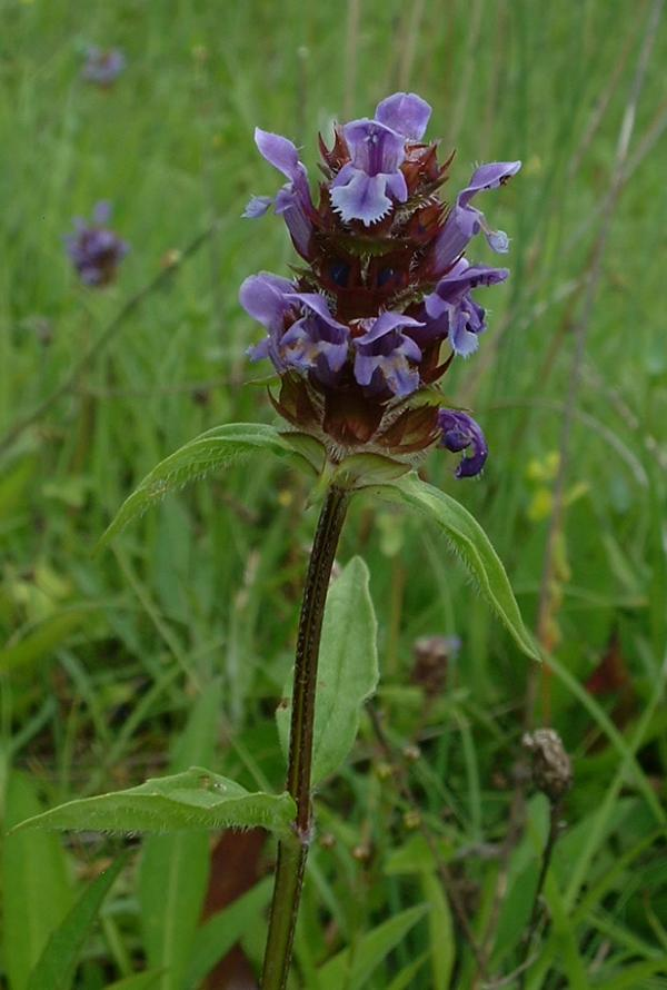 Brunelle commune, photo J.F. Gaffard, Bucey-lès-Gy, Juin 2004